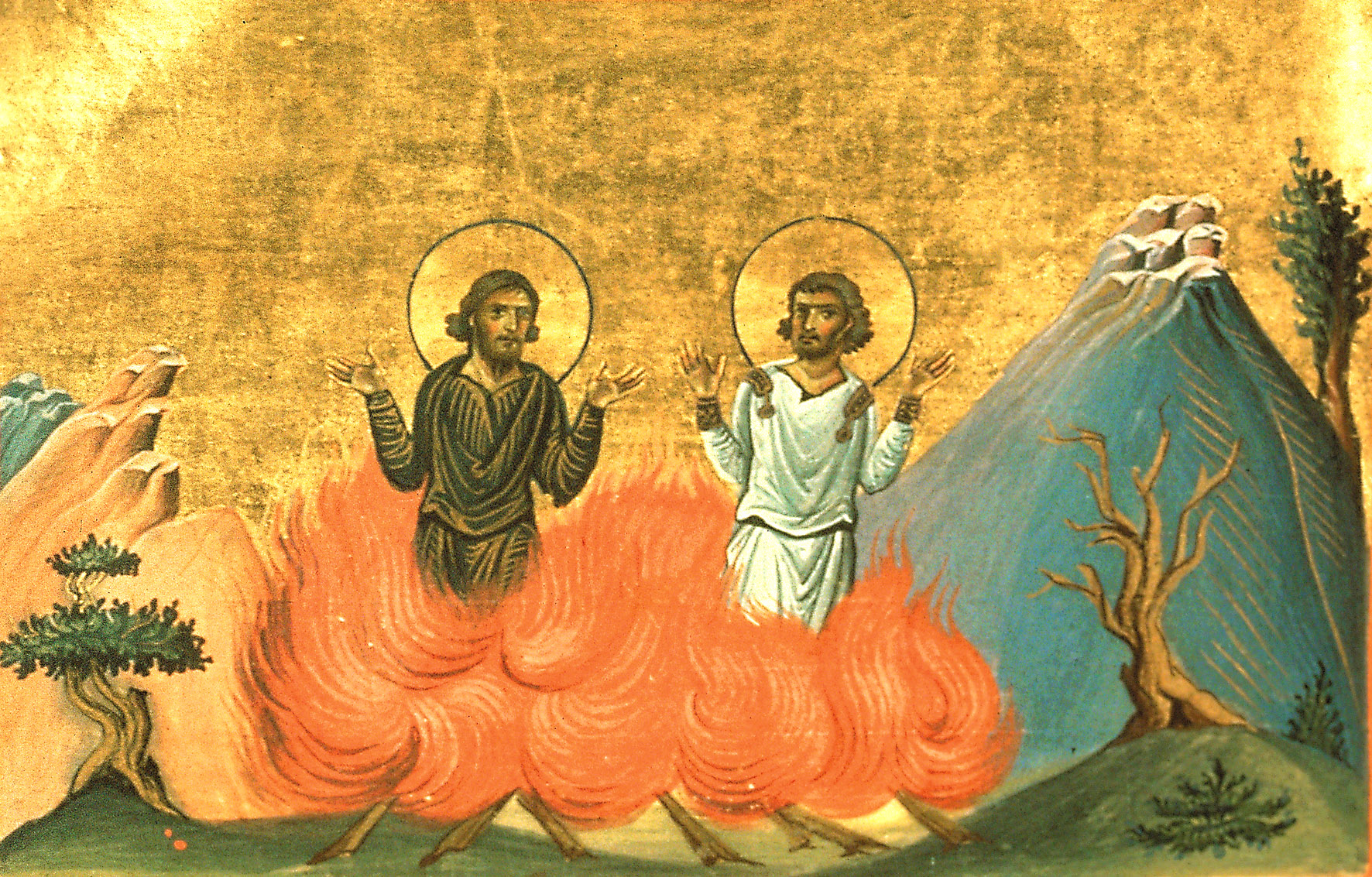 Мученики Максим и Феодот Адрианопольские. Миниатюра Минология Василия II. Константинополь. 985 г. Ватиканская библиотека. Рим